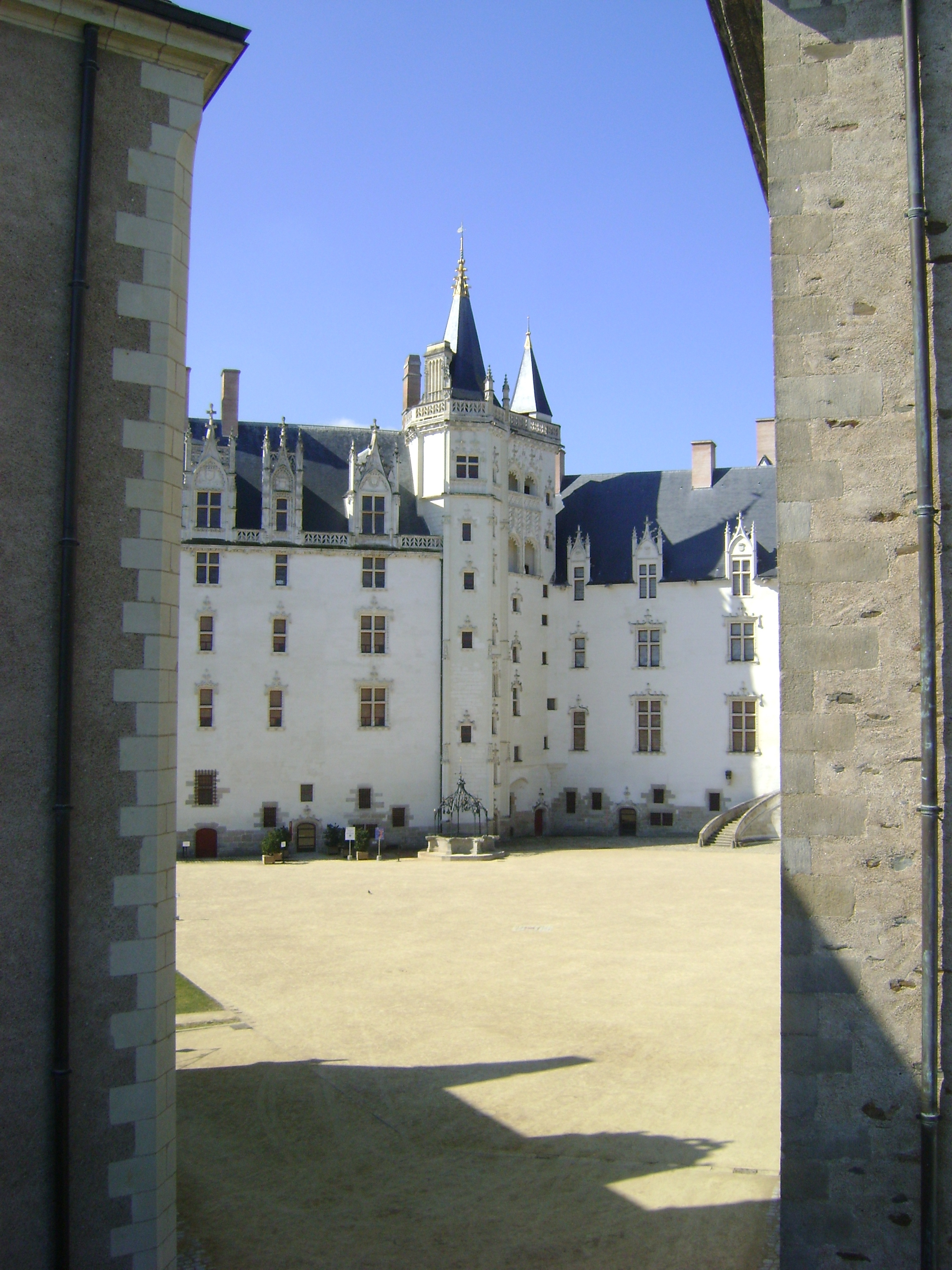 Château des Ducs de Bretagne, Nantes. La Tour de la Couronne d'Or. .